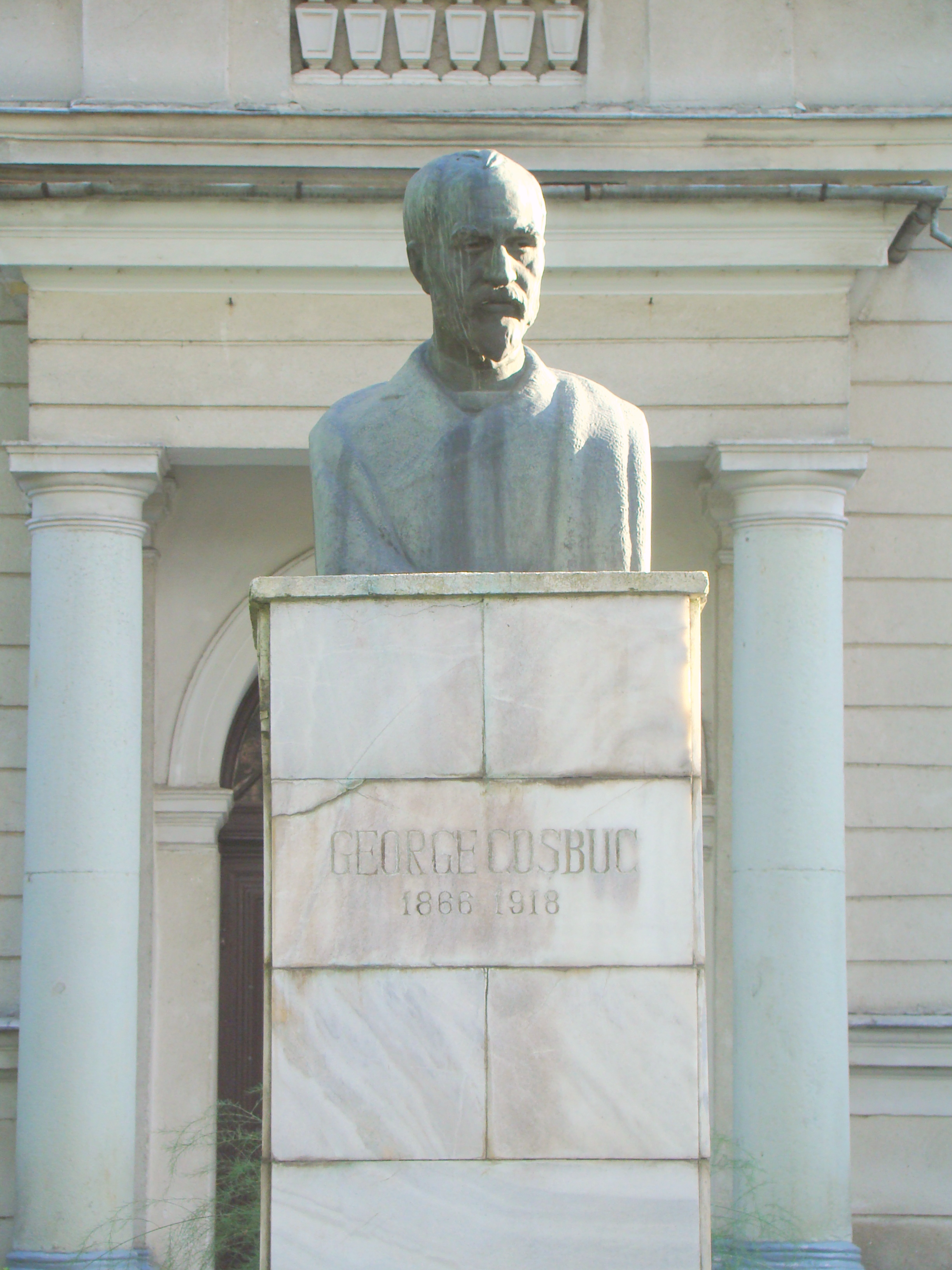 Bustul lui George Coșbuc, autor Corneliu Medrea, oraș Năsăud, Bd. Grănicerilor 2